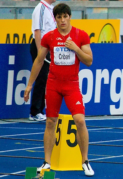 Marco Cribari beim Start zum Semifinallauf 200m